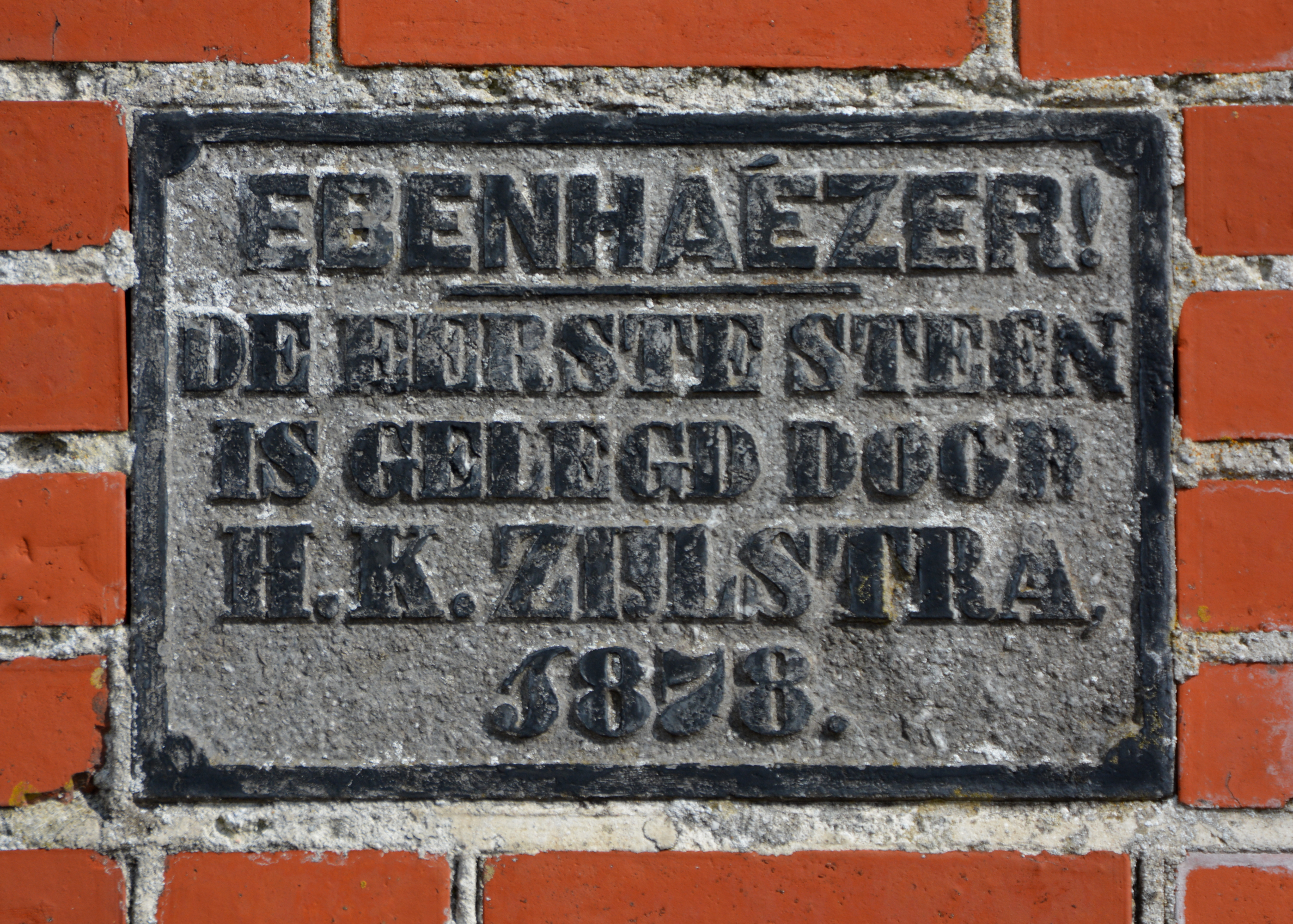 Twijzelerheide, Herformde kerk, gevelsteen